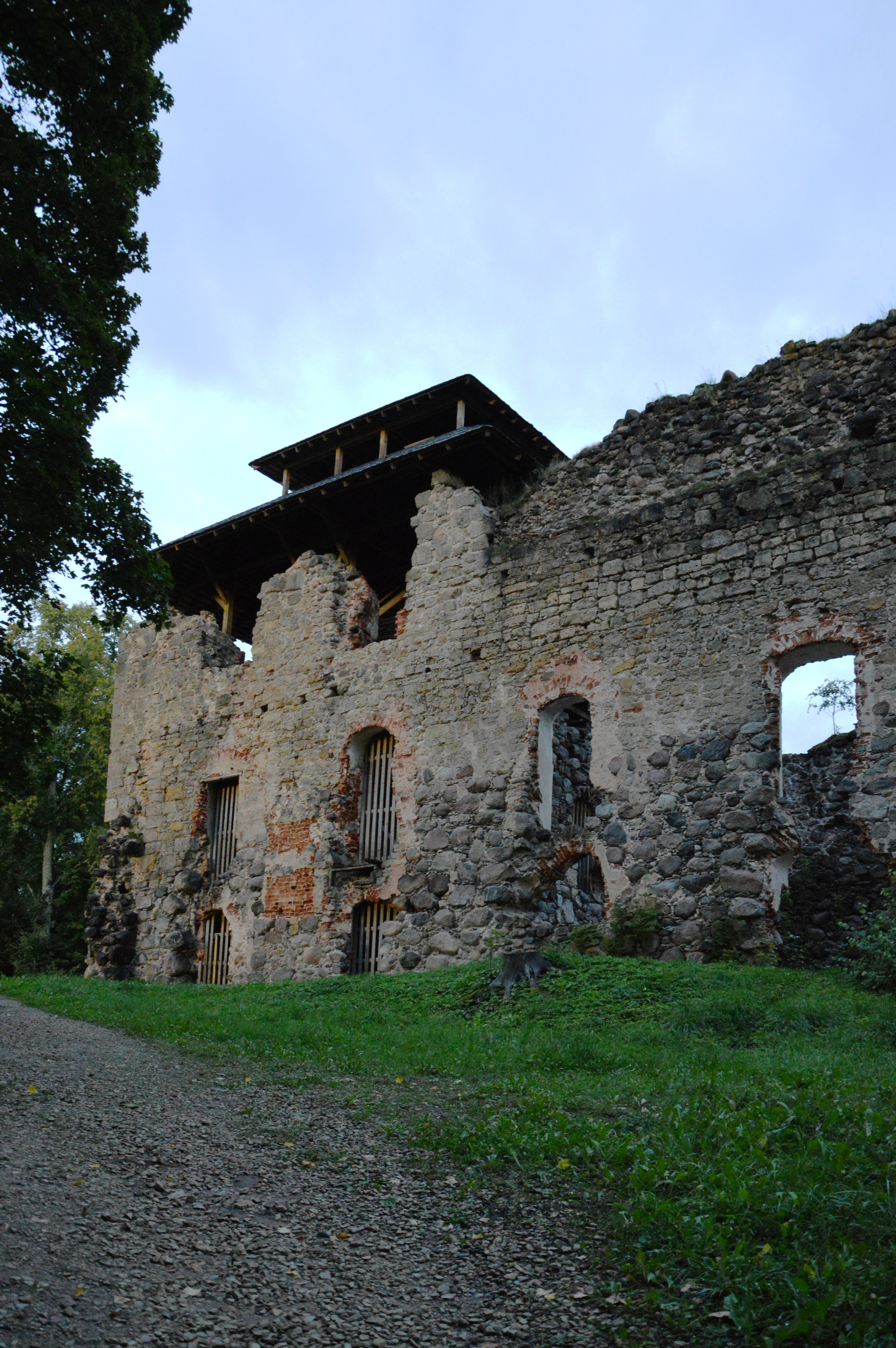 Rauna piiskopilinnus